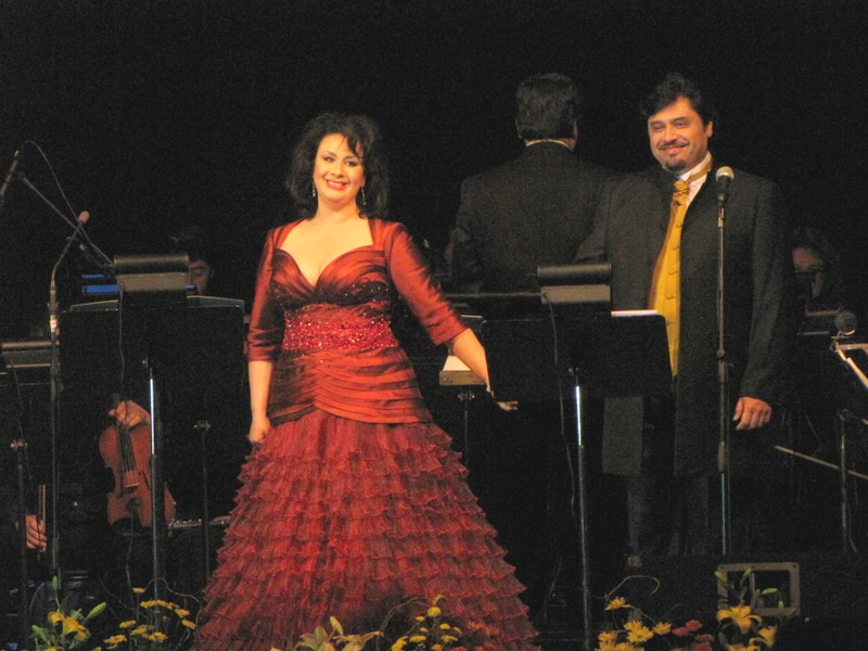 Talcahuano vibró junto a Verónica Villarroel